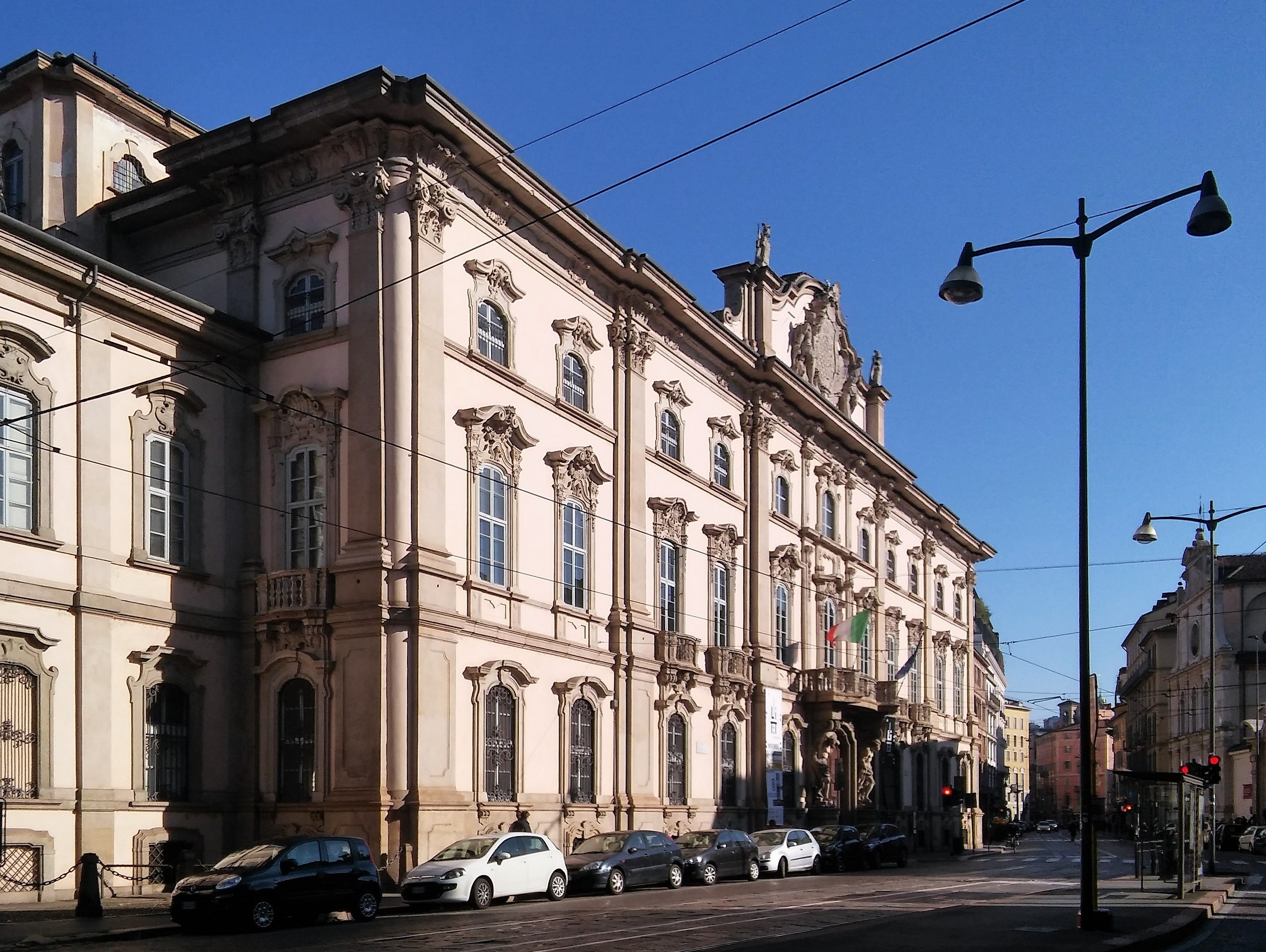 Facciata di palazzo Litta vista dal corso